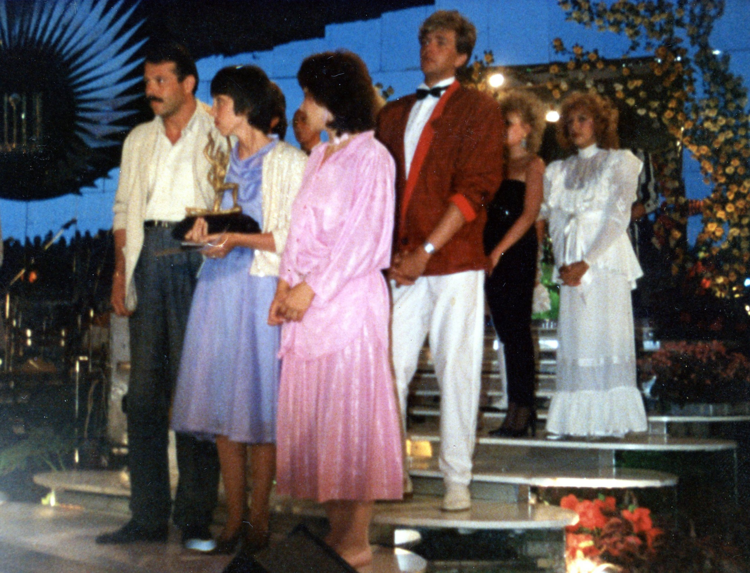 Мария Ганева - "Златният Орфей" 1986